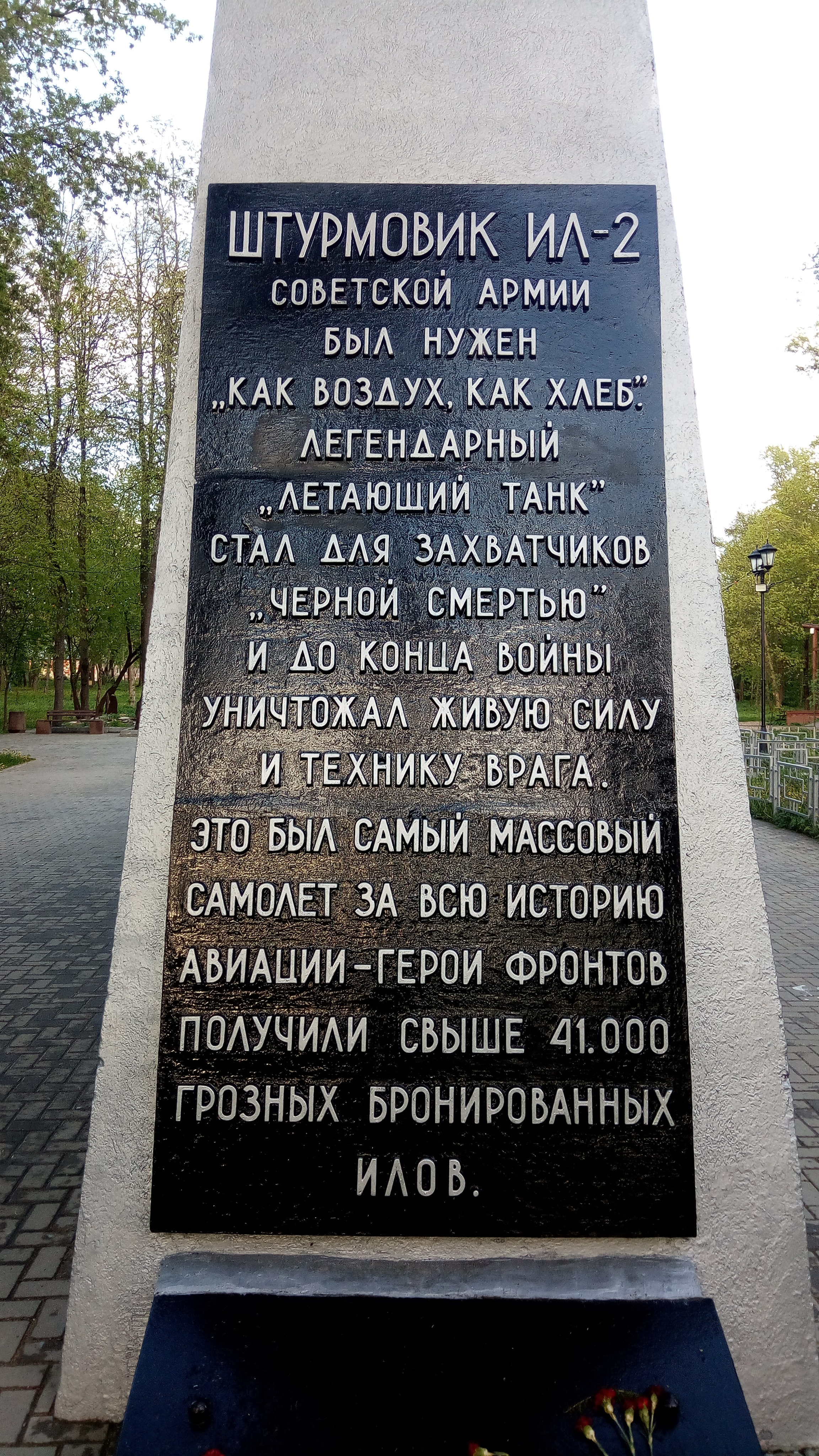 Памятник штурмовику Ил-2 в городе Истра Московской области